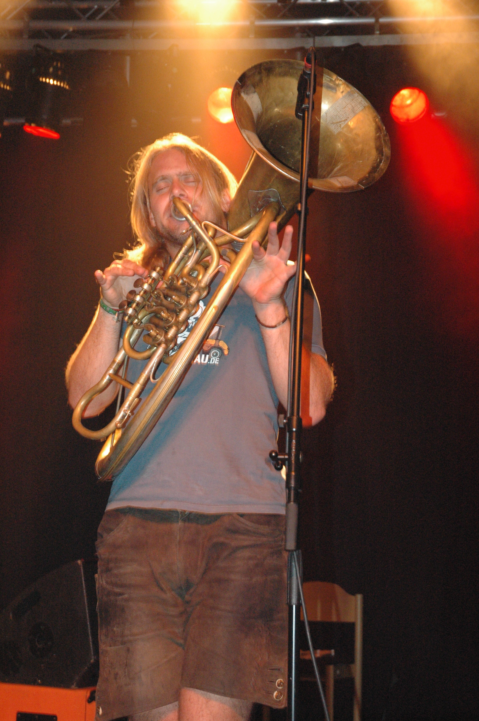 LaBrassBanda im E-Werk, Erlangen